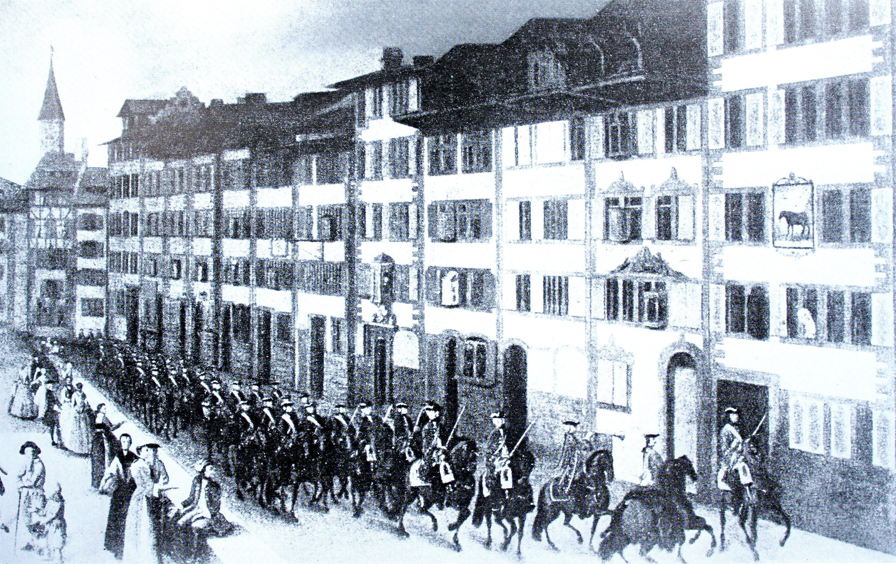 1744: Parade der Kavallerie durch den Rennweg. Auftragswerk von Major Hans Caspar Hirzel an den Maler Johann Felix Corrodi. Hirzels Wohnhaus ist ganz rechts, das «Haus zum Büffel», Rennweg 25. Die Frau im ersten Stock ist seine Frau.